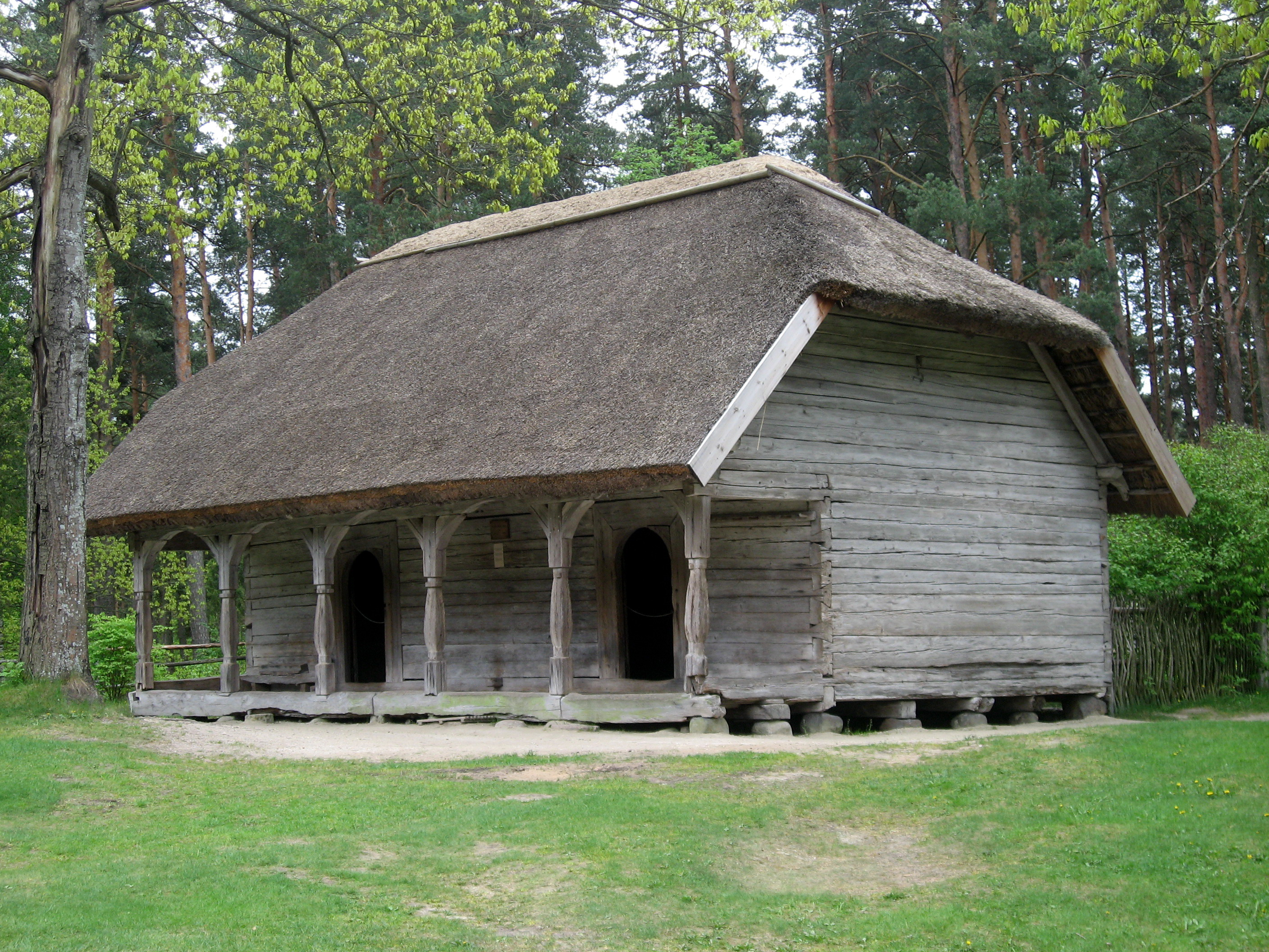 Lotyšské etnografické muzeum v přírodě: Dvojídílná zásobárna na obilí a textil, oblast Kurzeme, Kuldīga, "Dižlīķi", postavena roku 1767